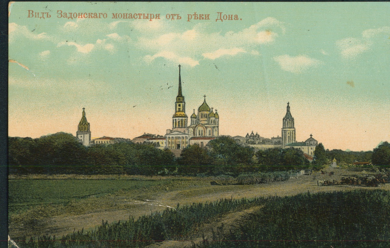 Вид Задонского монастыря от реки Дон.jpg